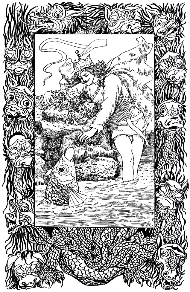 Aleksander Chodźko: Fairy Tales of the Slav Peasants and Herdsmen. Übersetzung aus dem Französischen und Illustrationen von Emily J. Harding. London : : George Allen, 1896